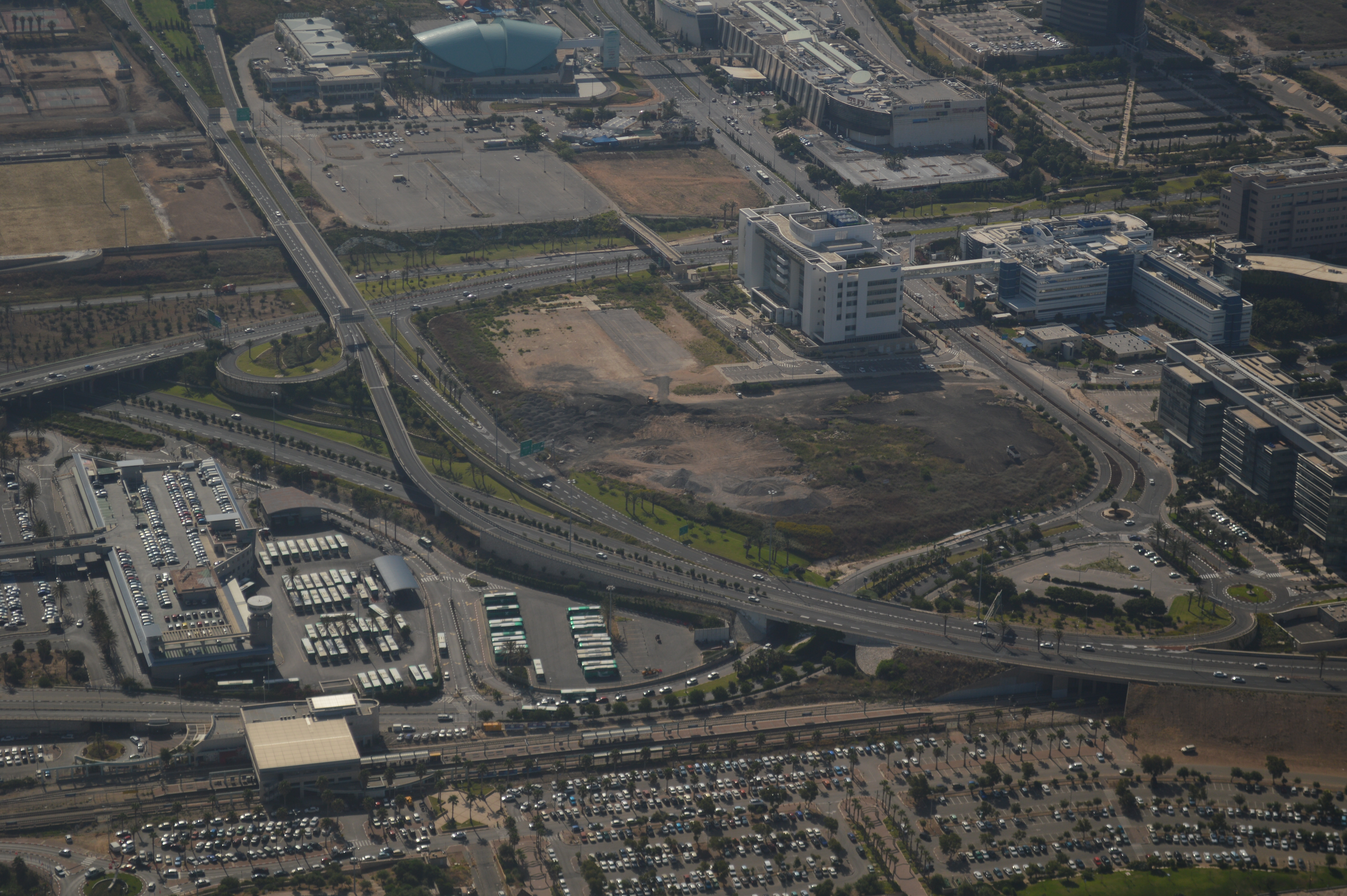 צילום אוויר של מת"ם, מחלף חיפה דרום ותחנה מרכזית חוף הכרמל